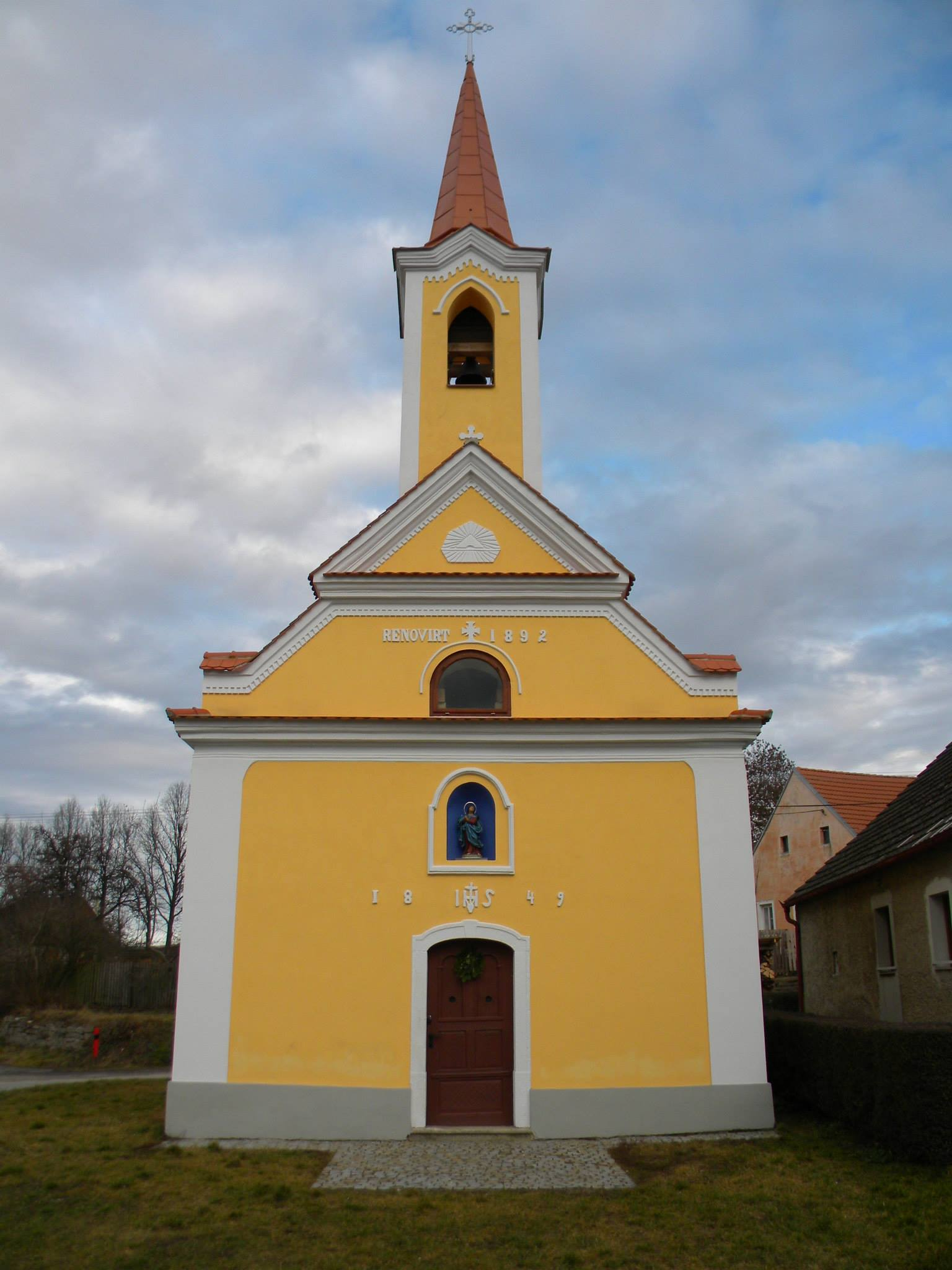 Kaple Panny Marie Loretánské, Malíkov nad Nežárkou.